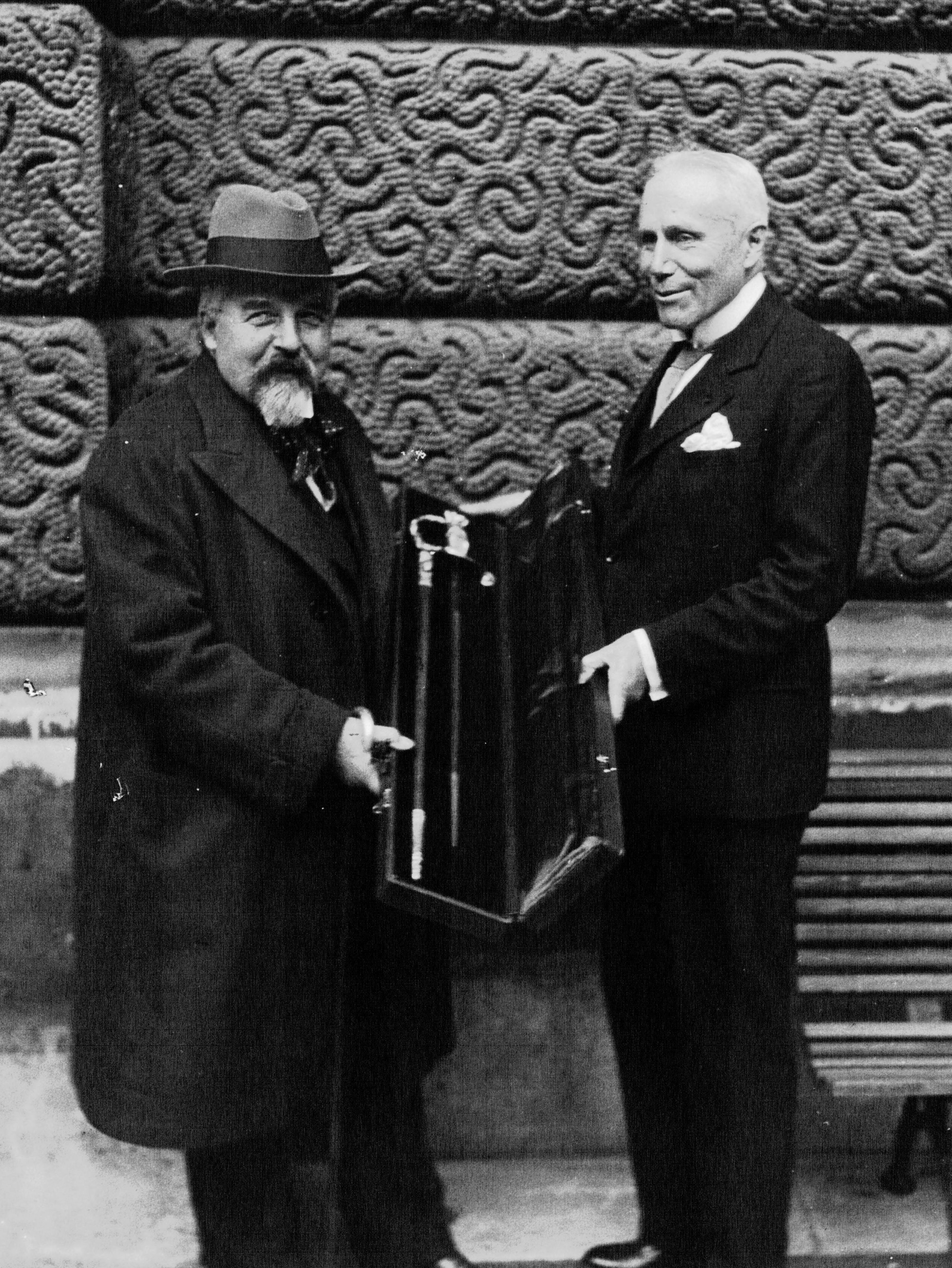 M. Paul Jamot (à droite) conservateur du Musée du Louvre remet son épée d'académicien au peintre Maurice Denis : photographie de presse (Agence Mondial)